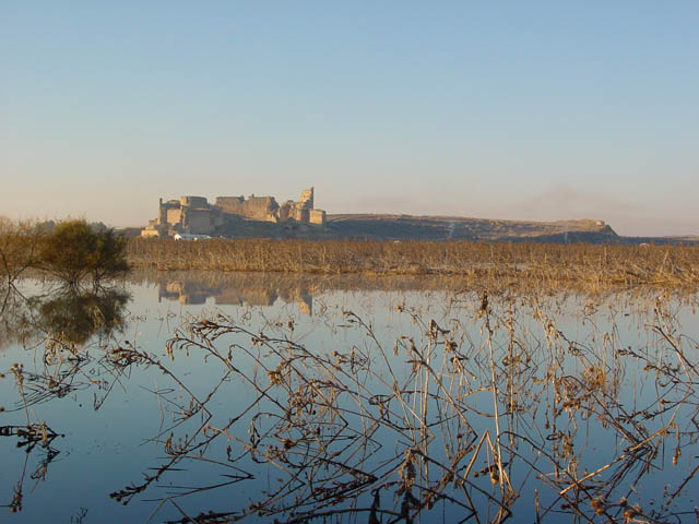 Calatrava la Vieja desde el norte. Castillo. Ciudad Real. España